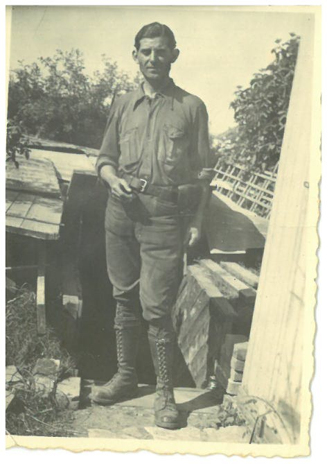 André Berthaud, quelques jours après avoir accueilli Maurice Schumann dans son jardin. Collection particulière de Mikaël Berthaud.